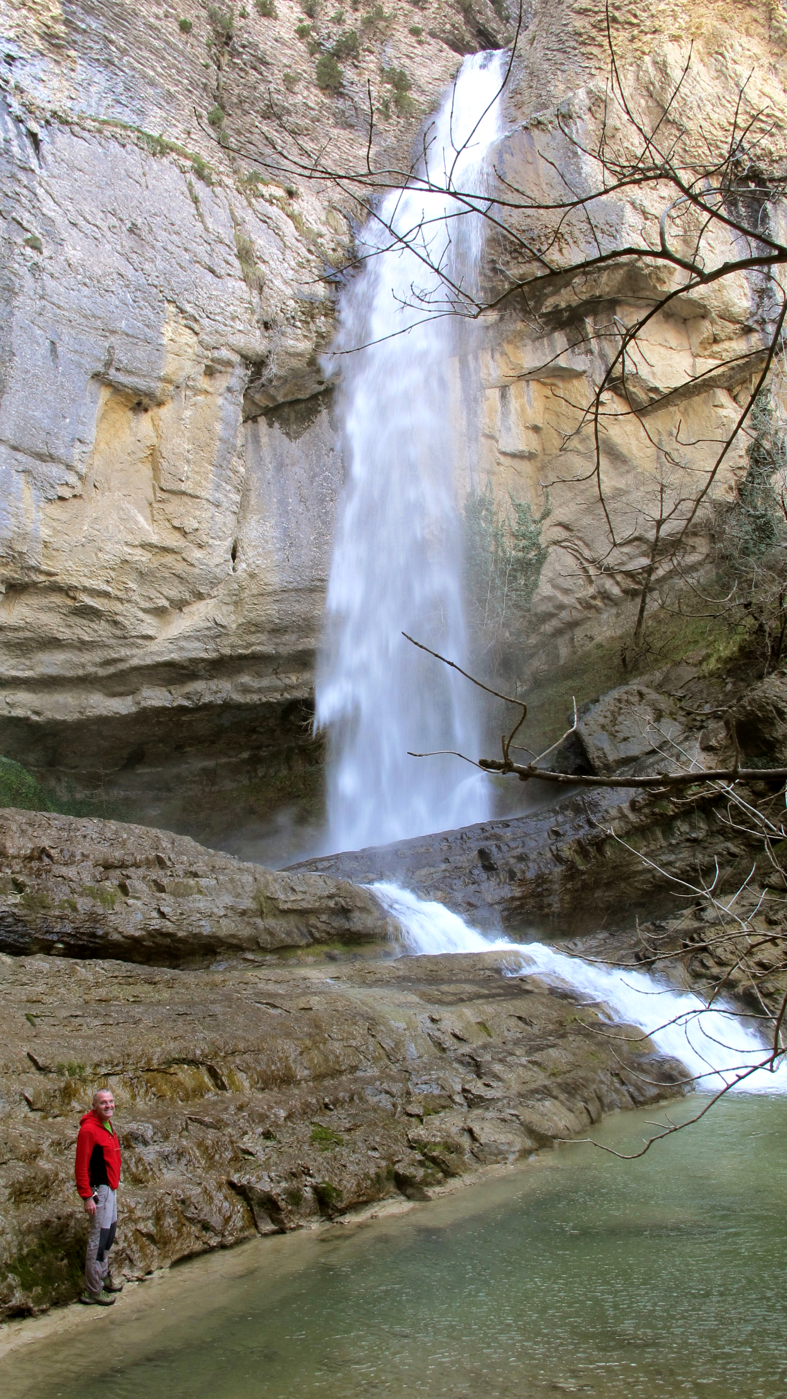 Olloranan dagoen Artazulgo zintzurraren amaieran izen bera duen ur-jauzia dago.